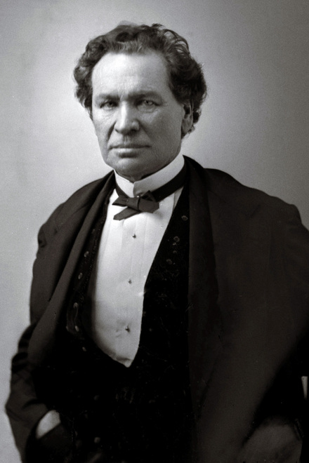 "[Es wurde] ein Portrait des Milzbrand-Entdeckers, dem Arzt Aloys Pollender (1799 – 1879), aus dem Jahr 1869 entdeckt."